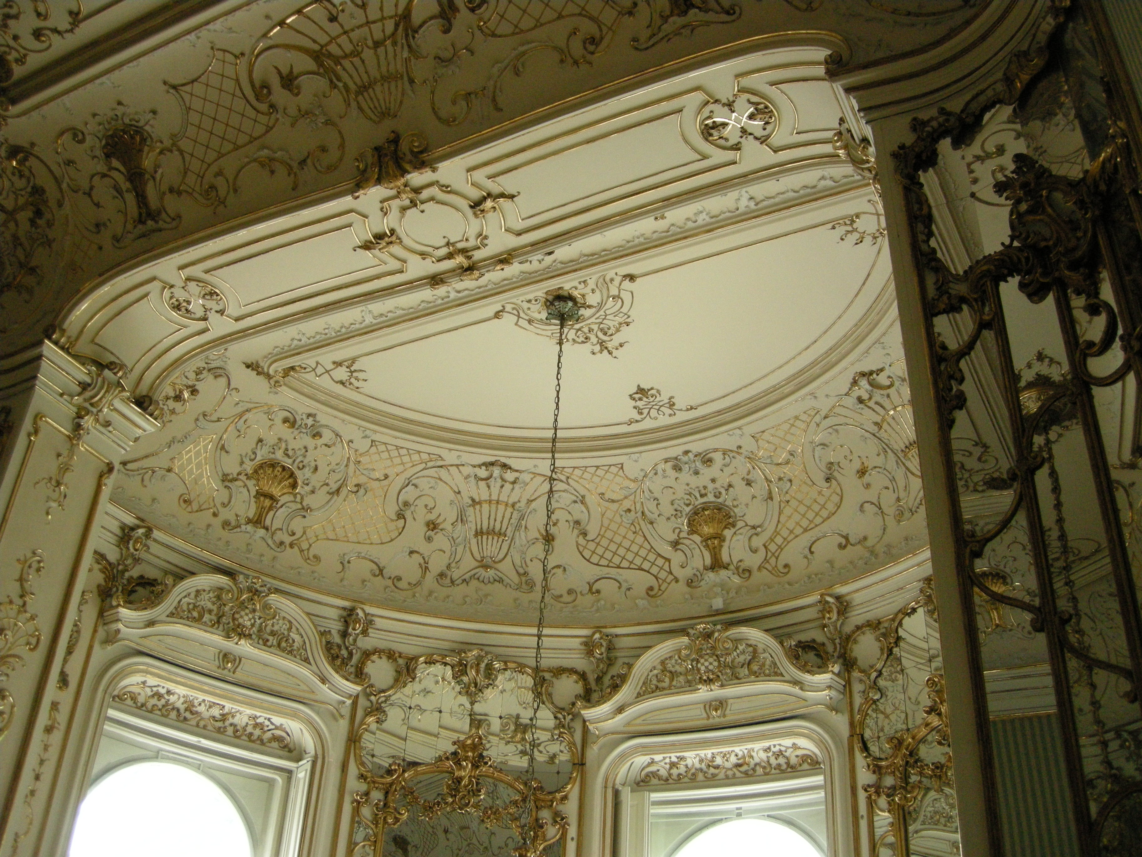 Budapest